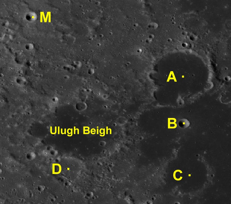 Cráter lunar Ulugh Beigh. Cráteres satélite. (Imagen LRO)